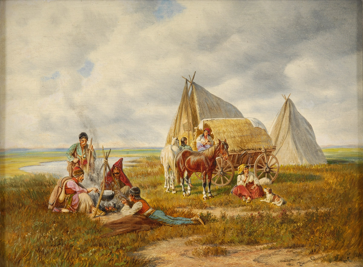 Der Halt in der Puszta. Signiert. Öl auf Holz, 24 x 32,5 cm